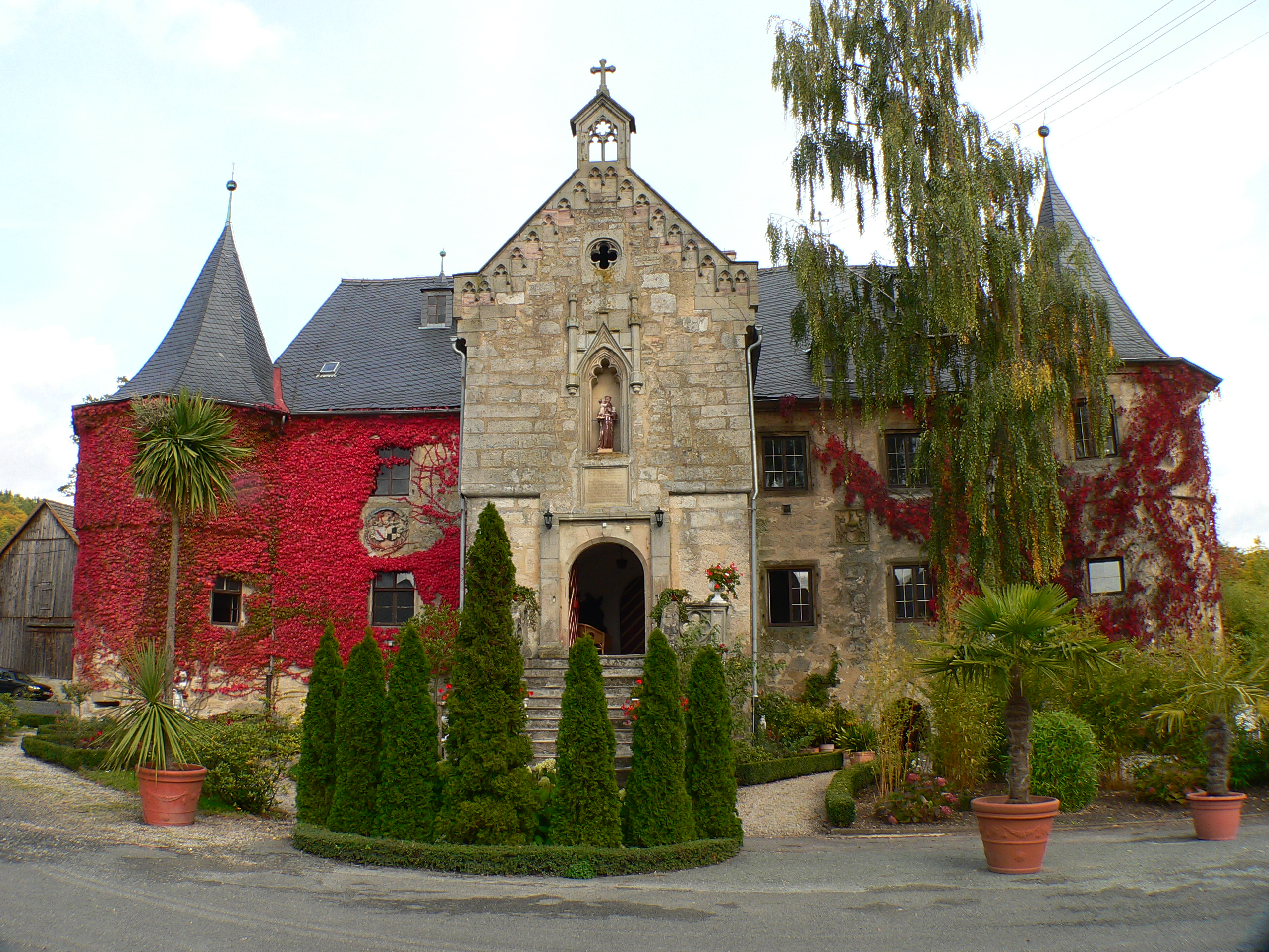 Schloss in Küps-Schmölz, Bayern, Regierungsbezirk Oberfranken, Landkreis Kronach